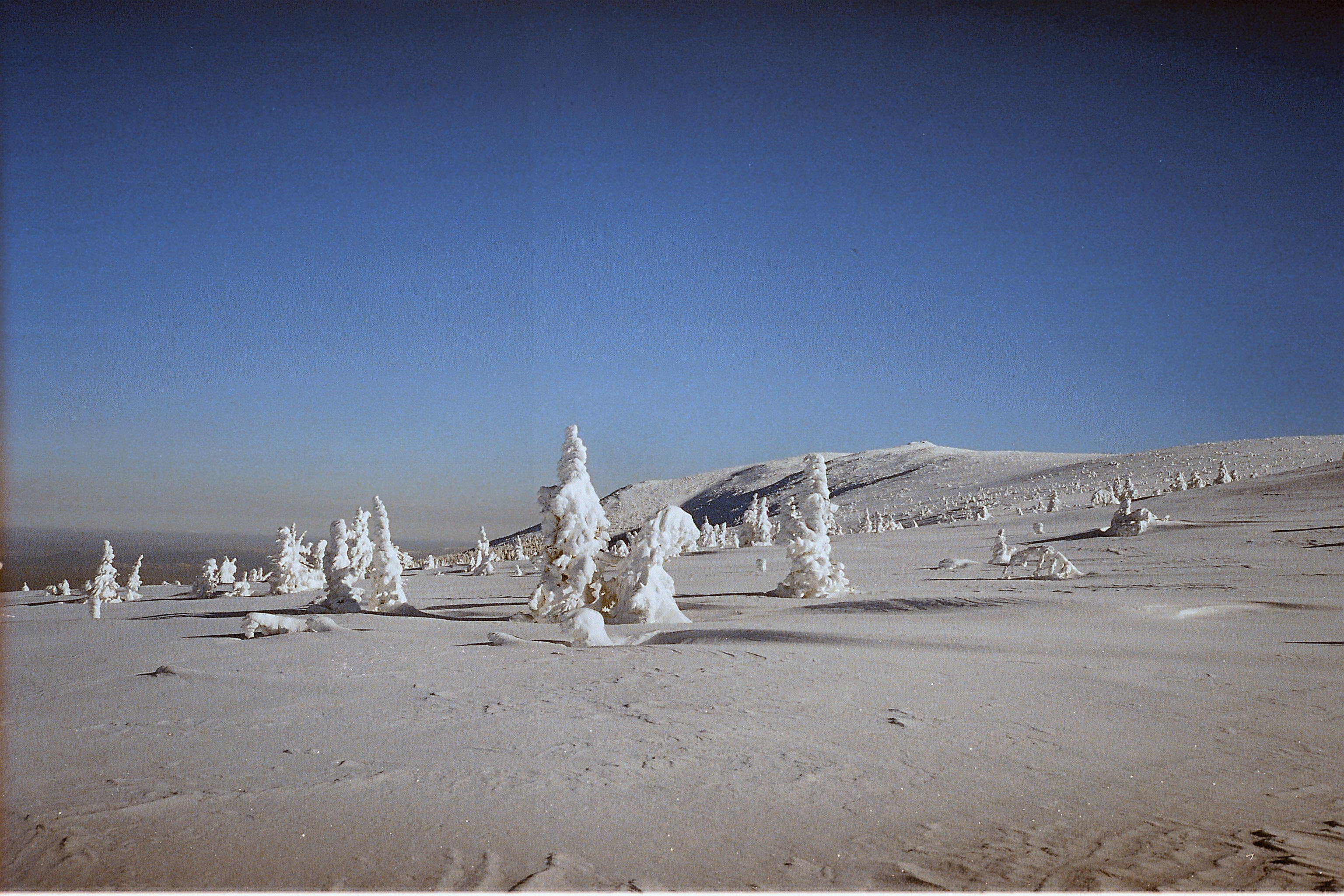 Karkonosze mountains. Winter 2005.